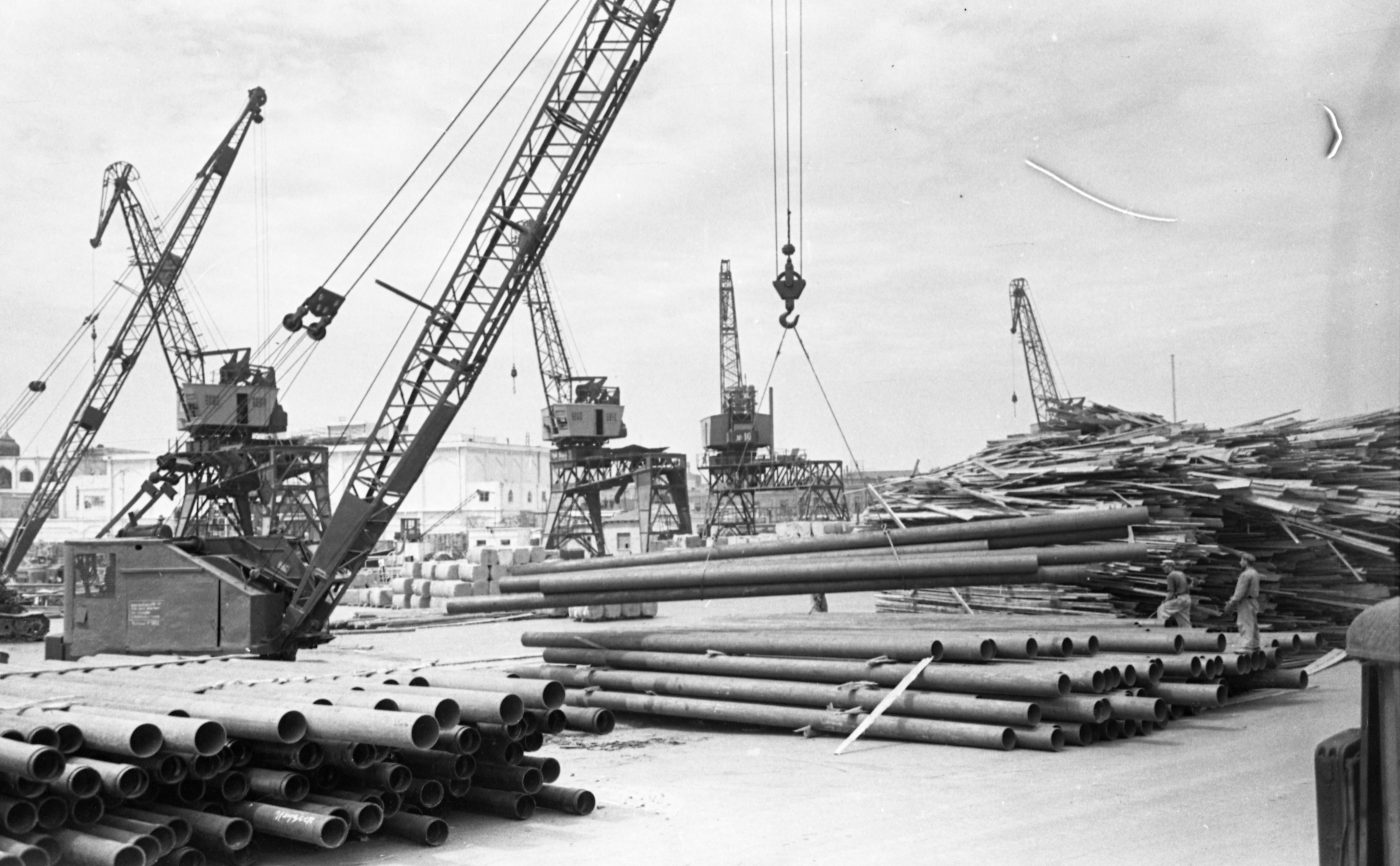 Bakı Limanı 1902-ci ildə